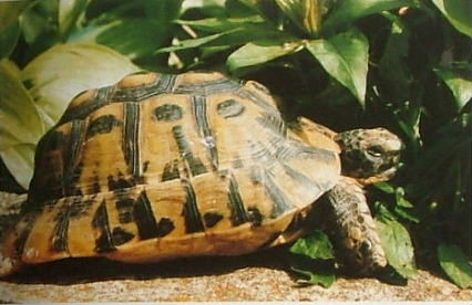 Testudo graeca, Weibchen, Tunesien